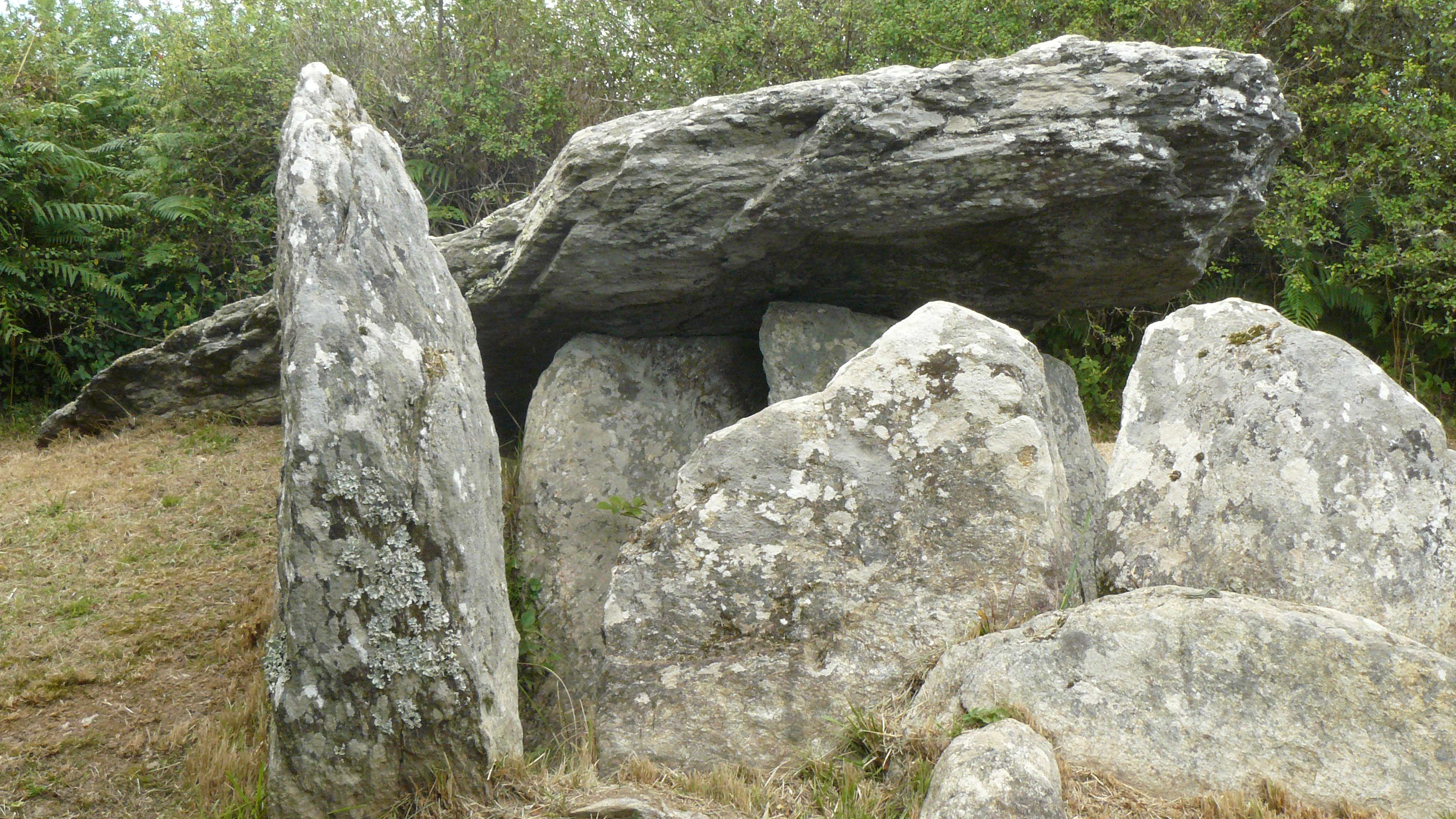 Allée couverte à 300m du lieu-dit de Kerrohet. Encore bien identifiable elle mesure 12 mètres de longueur pour 1 mètre de largeur. Il y a deux dalles de couverture qui subsistent et le cairn est encore en place. Une dalle a été déplacée et se trouve en aval du chemin.